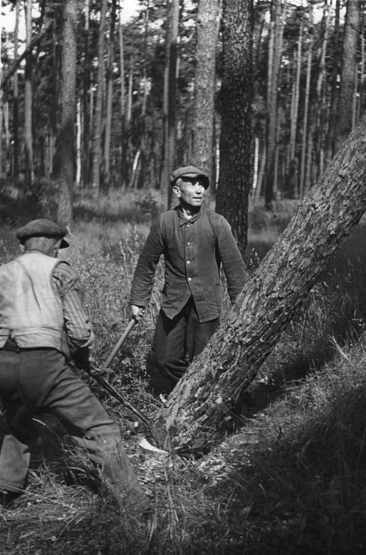 Mark Brandeburg, Holzfäller bei der Arbeit Frühjahr 1946 Holzfäller bei der Arbeit (Mark Brandenburg) Aufnahme: Erich O. Krueger 205-46